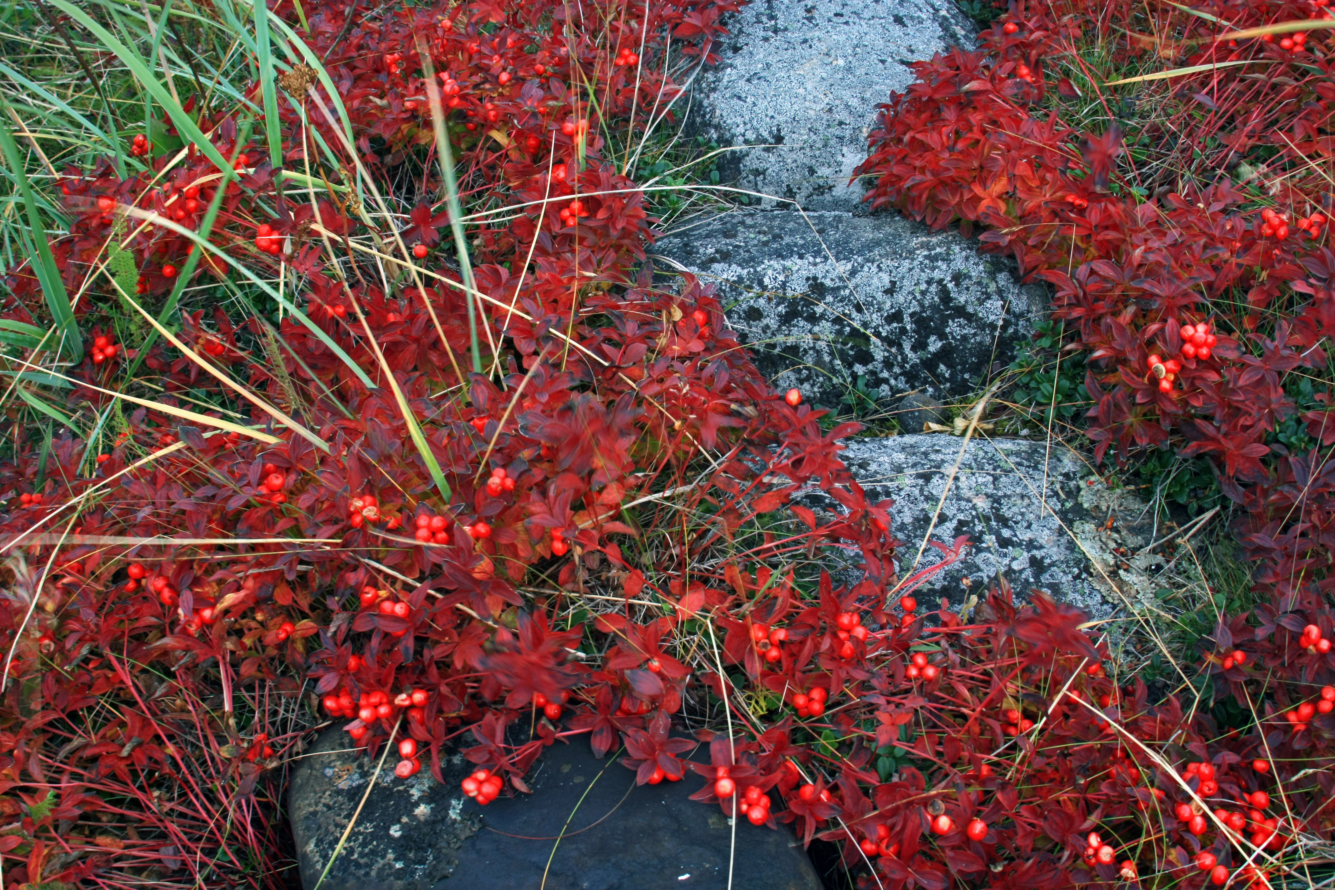 Rohelised pohlavarred ja punaseks värvunud rootsi kukitsa lehemättad